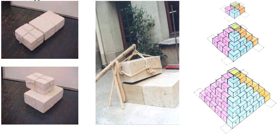 Principe constructif dit « Algorithme de Crozat » inspiré de la description d'Hérodote qui génère des constructions pyramidale par application itérative et qui, selon le Système constructif des pyramides, aurait constitué le mode opératoire de base des constructeurs des grandes pyramides égyptiennes. Les deux blocs servant d'entablement correspondent au bomides et le bloc reposant en corbeau est le crossaï du texte de l'Enquête. 2004 Pierre Crozat